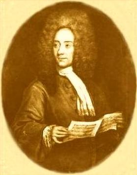 Tomaso albinoni (1671 - 1750)